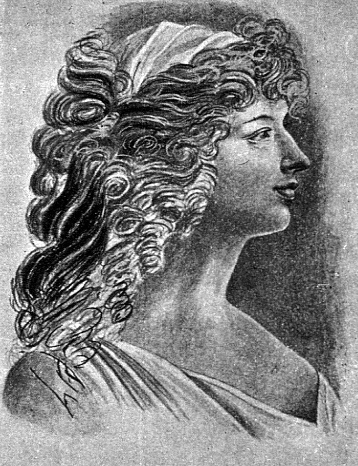 Bildnis Friederike von Reden (1774–1854)